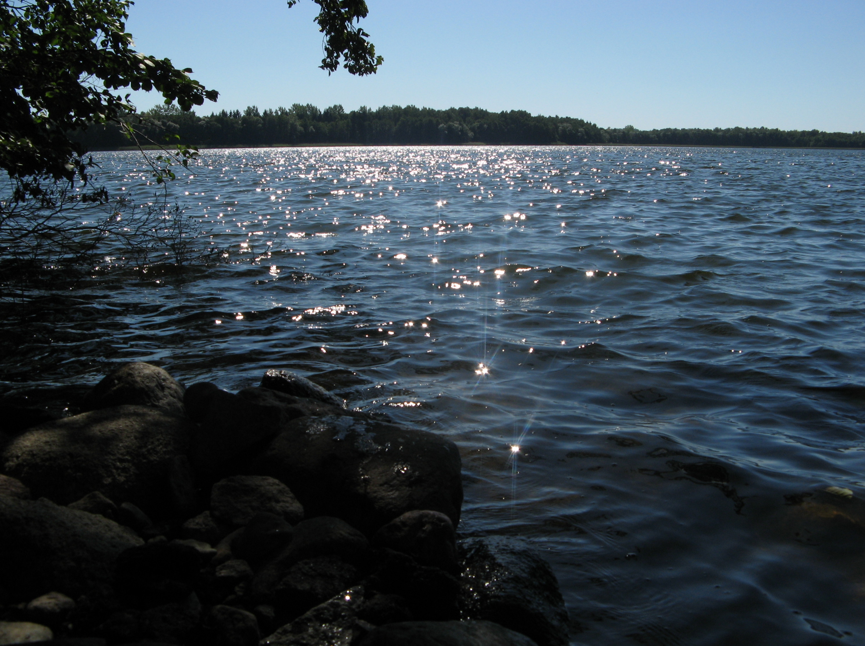 Jezioro Ińsko z grobli na południe